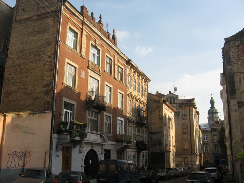 Улица Ивана Федорова во Львове (та часть, которая была Еврейской)